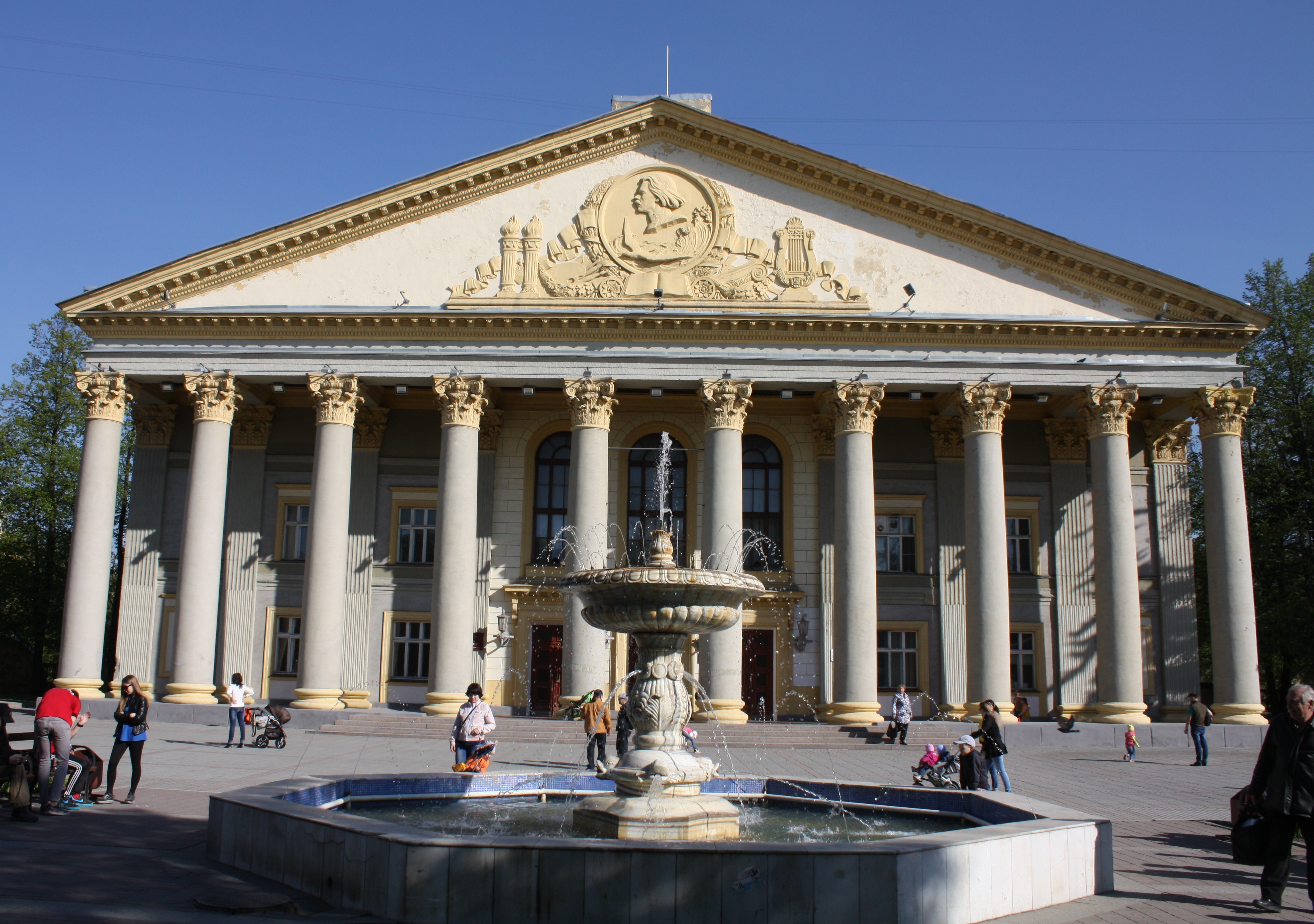 Дворец культуры имени Горького, Калининский район, Новосибирск.